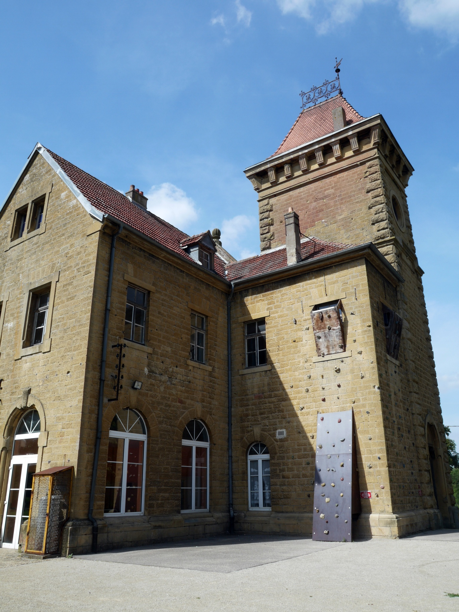 GARE IMPERIAL DE CHAMBREY ancienne limite frontière franco allemande 1870-1918, Old train station of Chambrey (département Moselle) in France